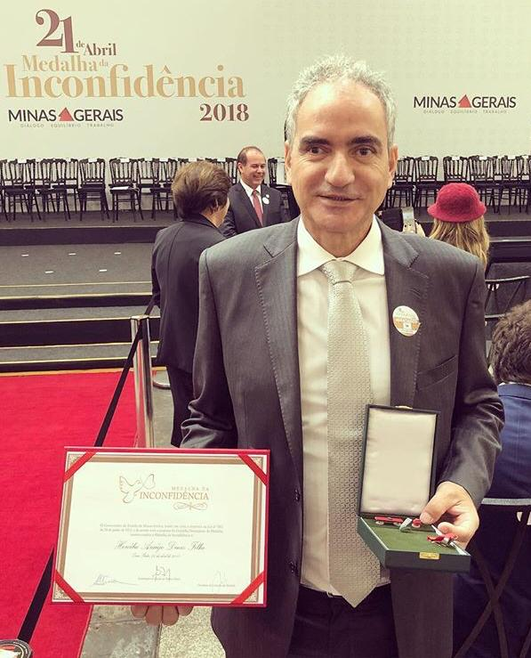 Hercílio Coelho Diniz recebendo a Medalha da Inconfidência, maior honraria do Estado de Minas Gerais, concedia a personalidades e instituições que contribuíram para o desenvolvimento do estado e do país.